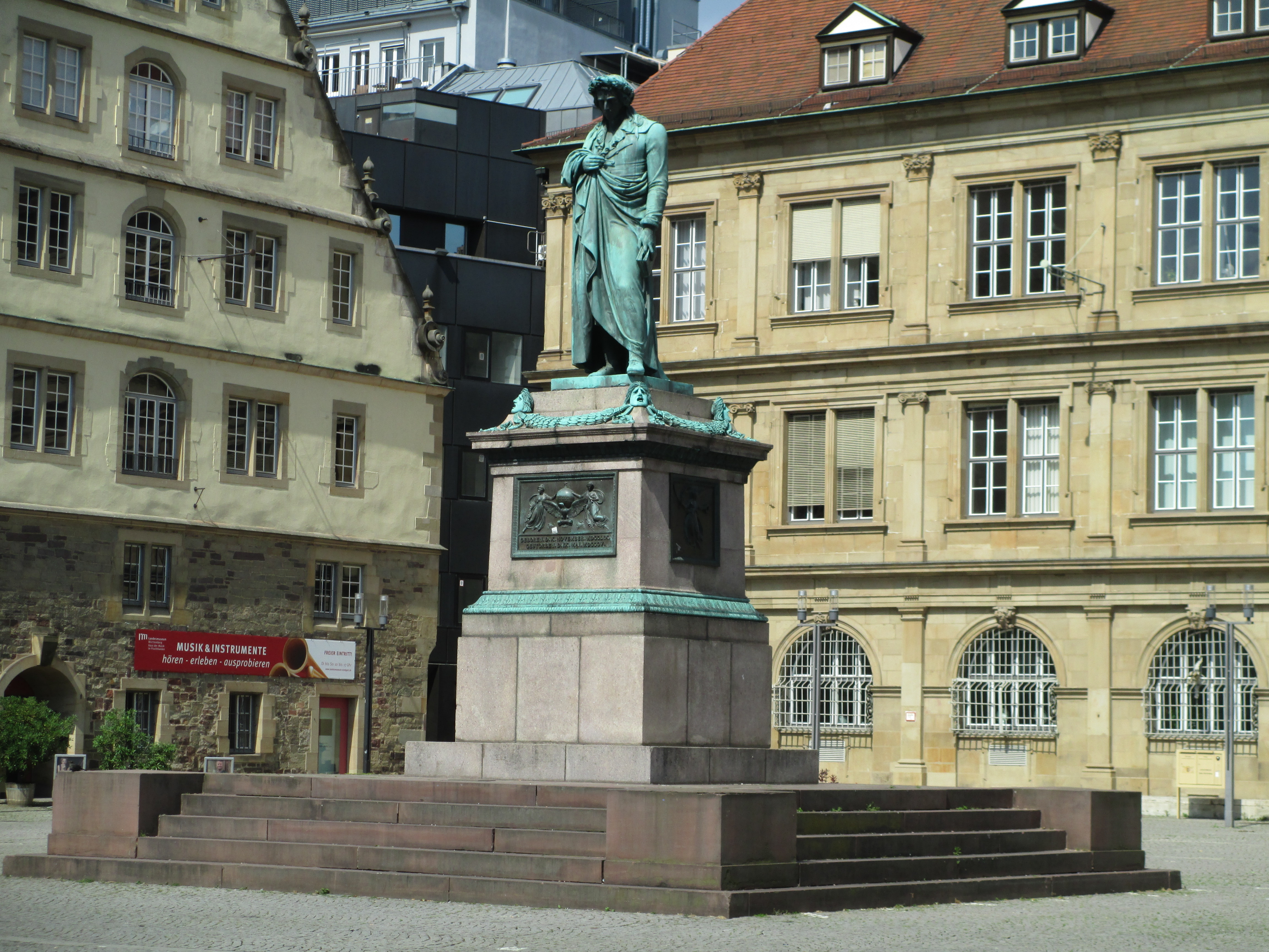 פסל של פרידריך שילר בכיכר שילר בשטוטגרט